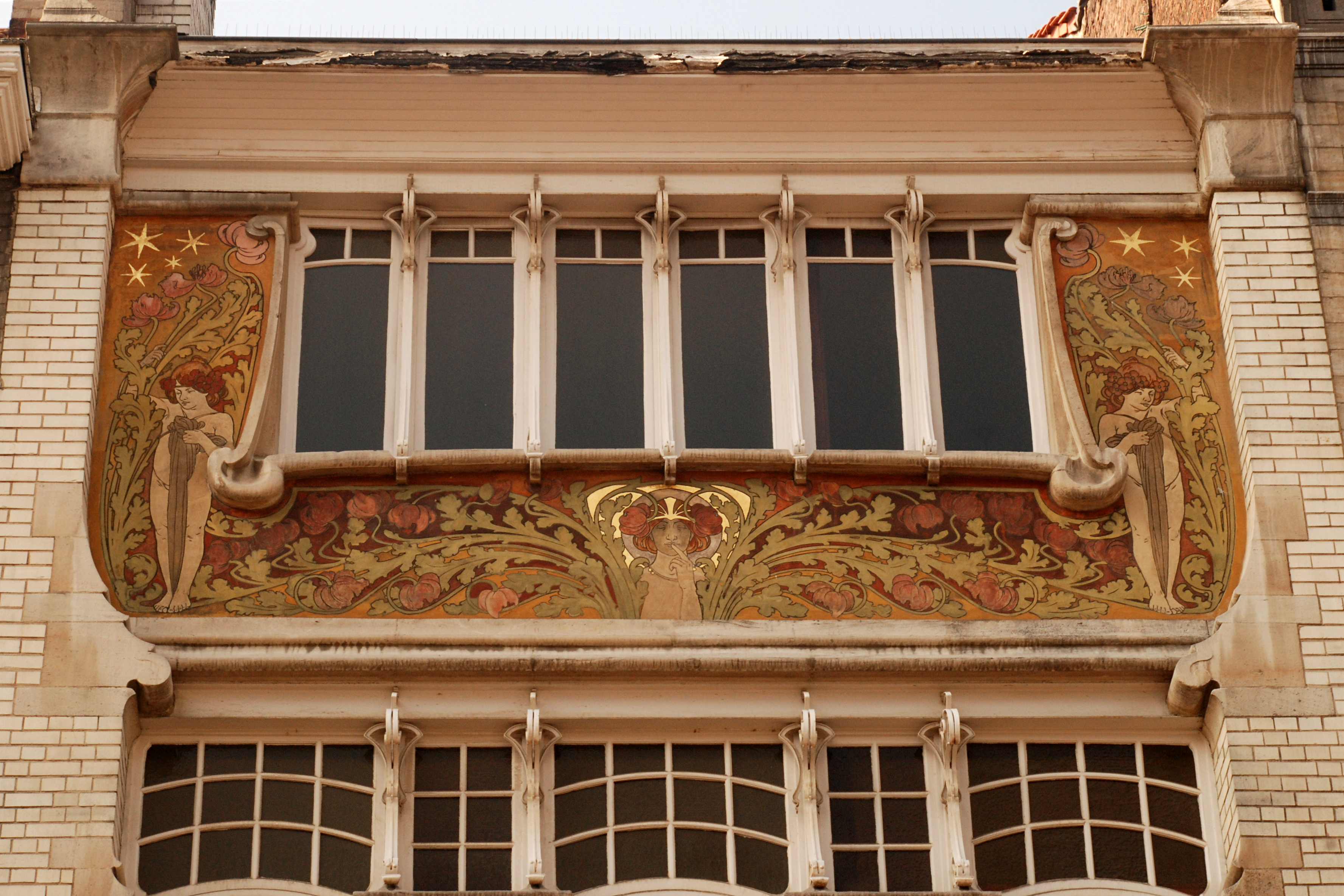 Belgique - Bruxelles - Maison Beukman (Art nouveau, architecte Albert Roosenboom, 1900)